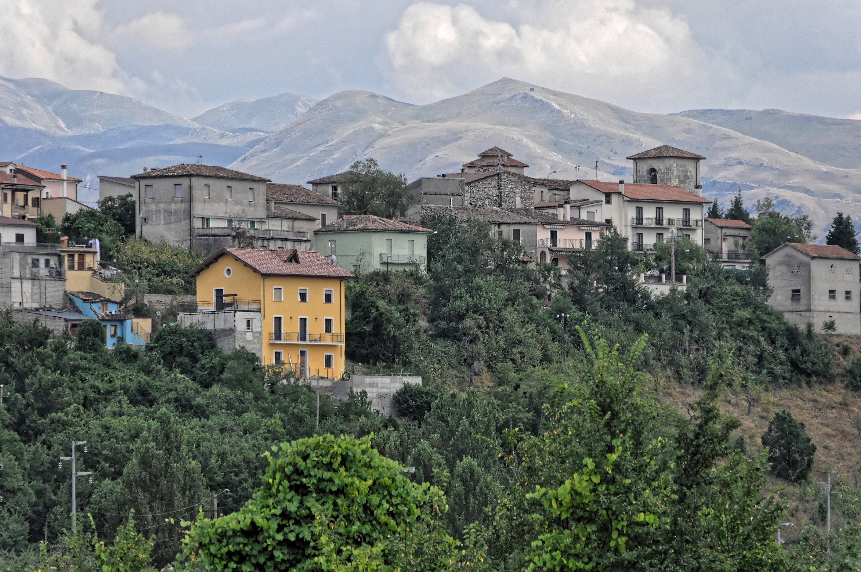 Amiternum 2013 Dieses Foto entstand in Zusammenarbeit mit Stadtbesichtigungen.de Die Seiten Stadtbesichtigungen.de, der dazugehörige Reise Blog sowie die Facebookseite: Stadtbesichtigungen Rom dürfen dieses Bild für Ihre Veröffentlichungen ohne den Hinweis auf Wikipedia, Commons bzw der Lizenz verwenden. Die Verantwortlichen habe von mir (Ra Boe) die Originaldaten zur freien Verfügung übermittelt bekommen.